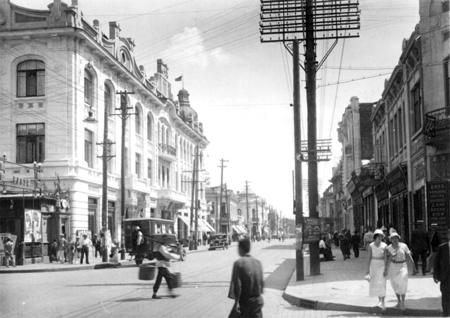 哈尔滨中央大街马迭尔宾馆旧照